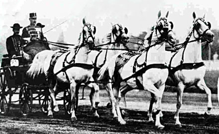 Attelage traditionnel de 4 chevaux arabe-shagya à Babolna, en Hongrie